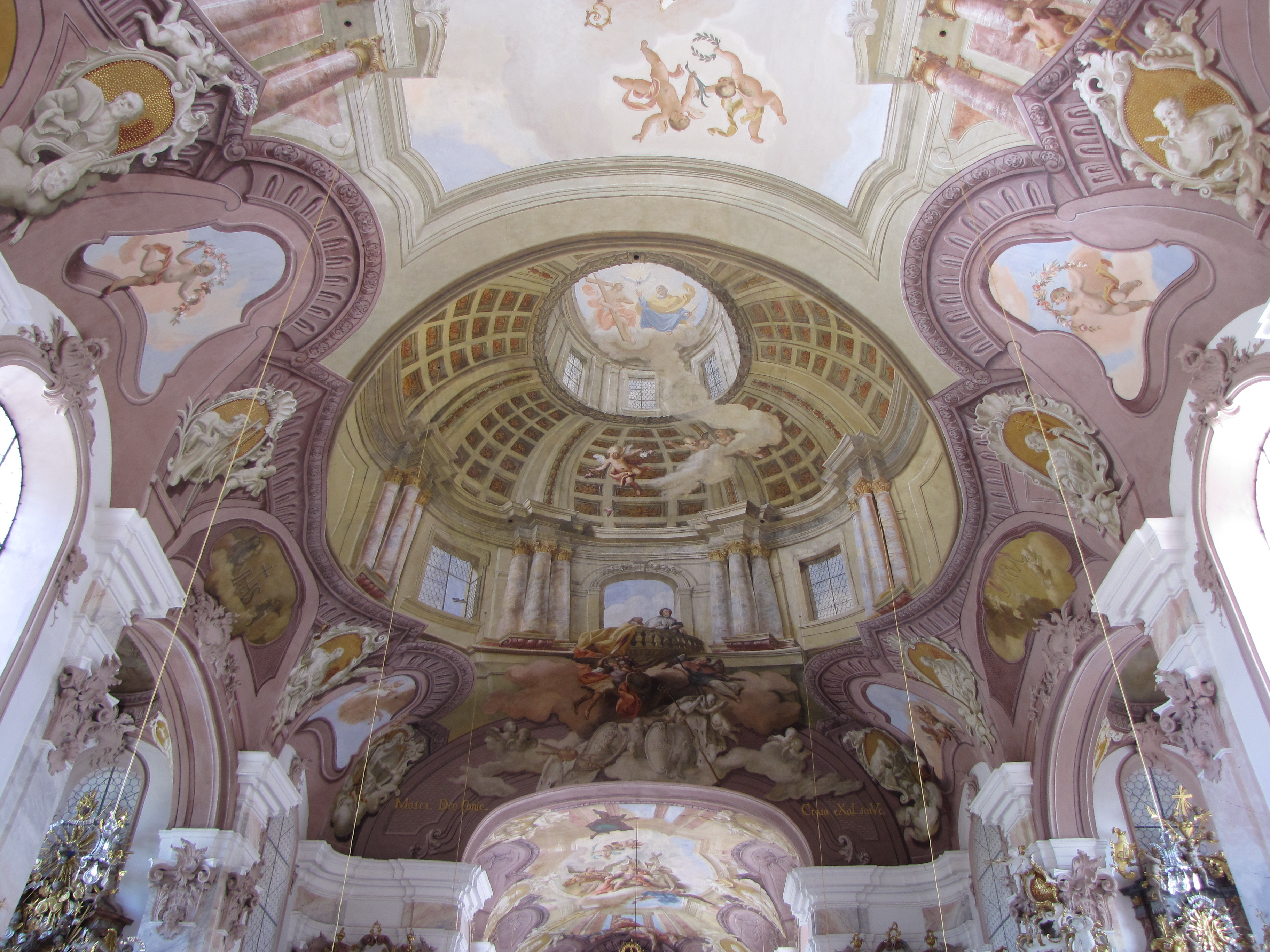 Deckenfresko von Franz Georg Hermann in der Pfarrkirche Stöttwang (Ostallgäu)